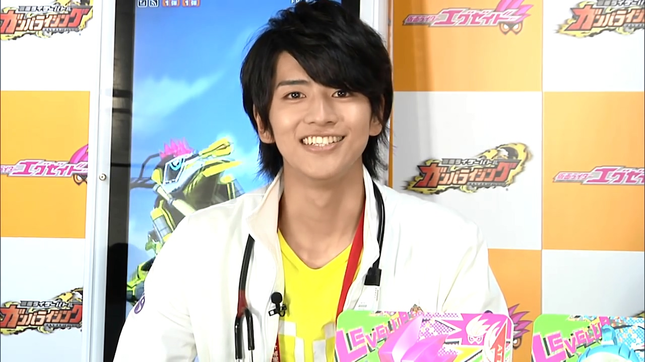 データカードダス 仮面ライダーガンバライジング ガシャットヘンシン 大はっぴょうかい